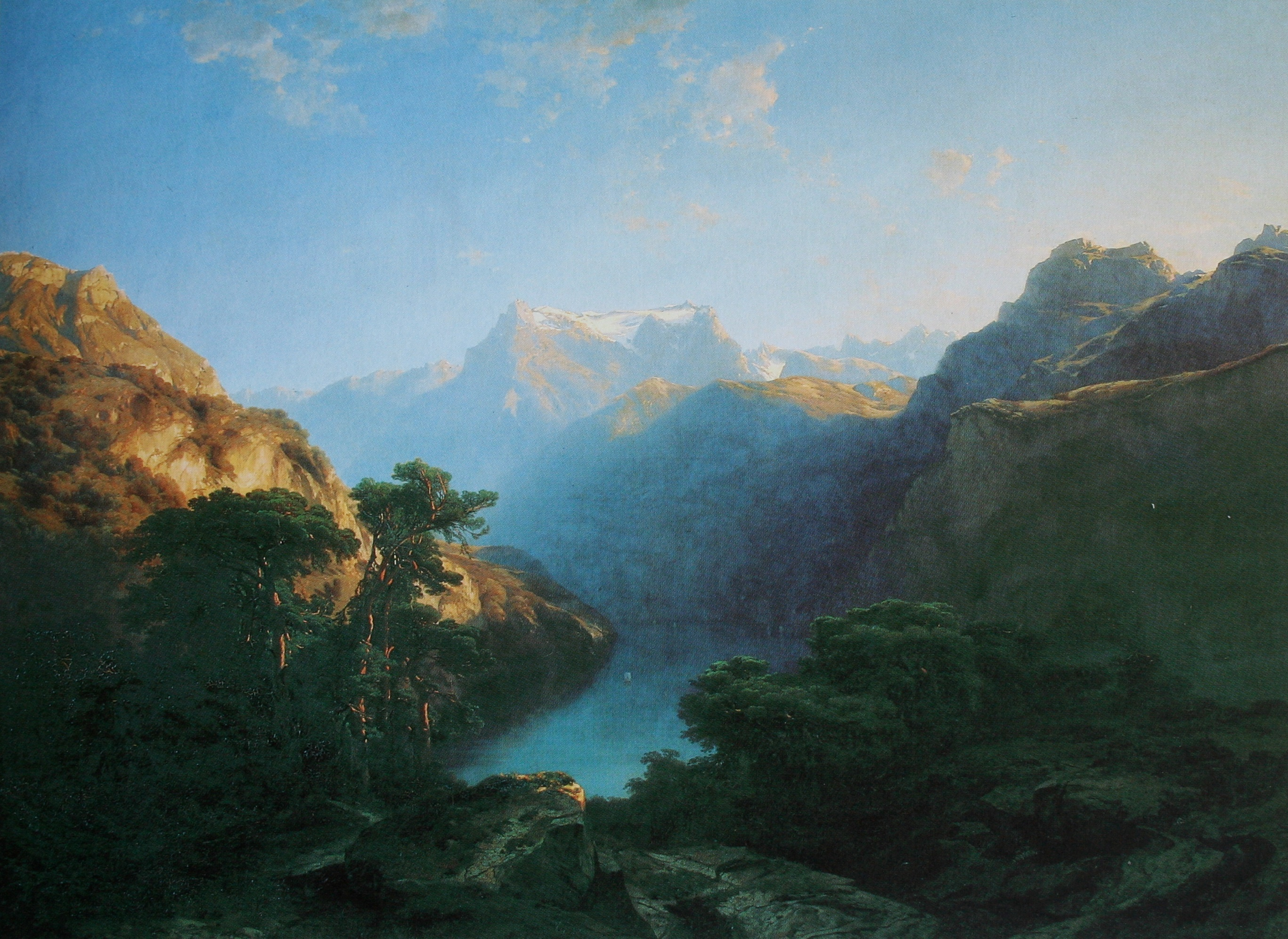 Am Urnerseelabel QS:Lde,"Am Urnersee"